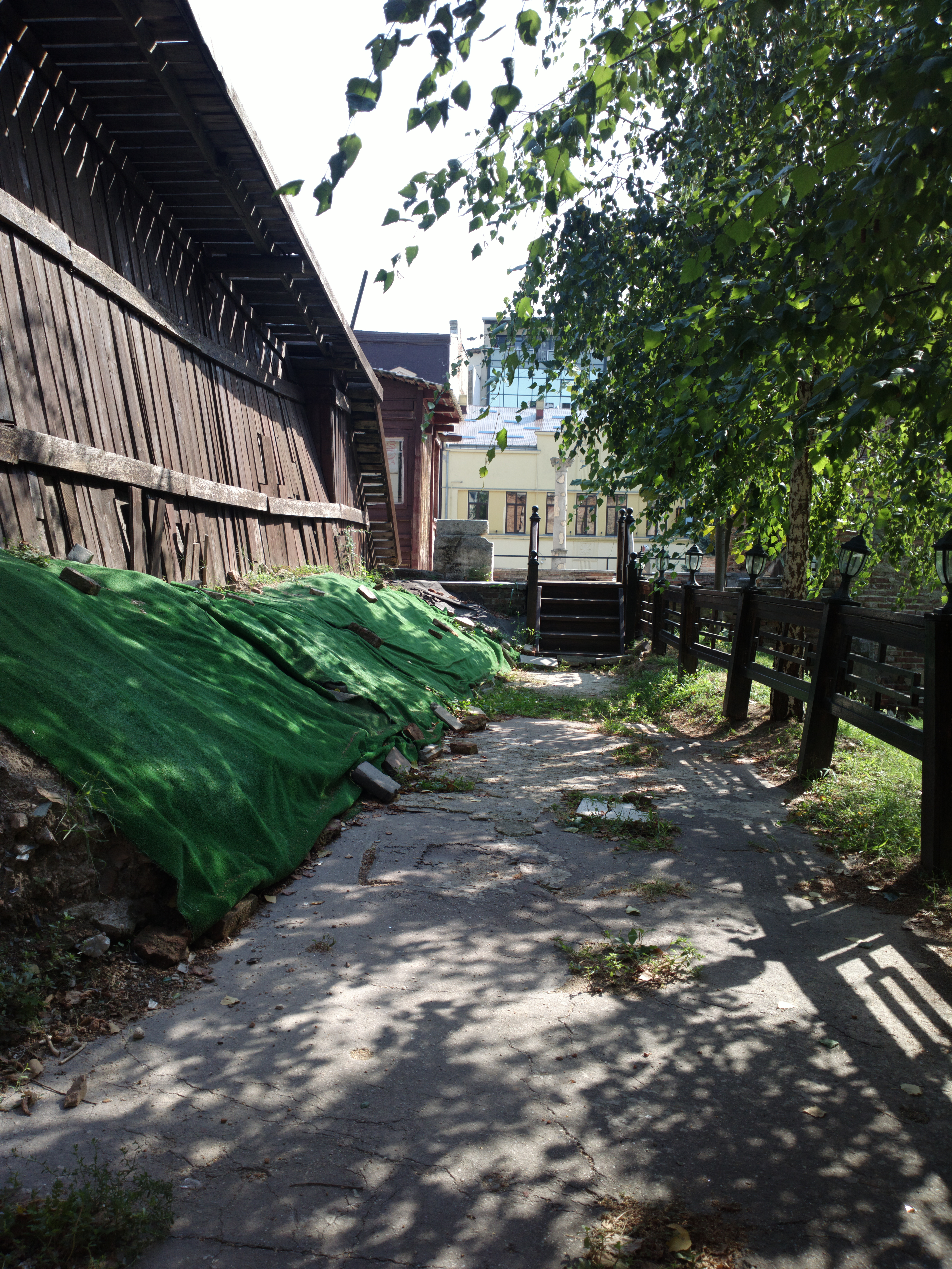 Curtea Veche-Baia turcească